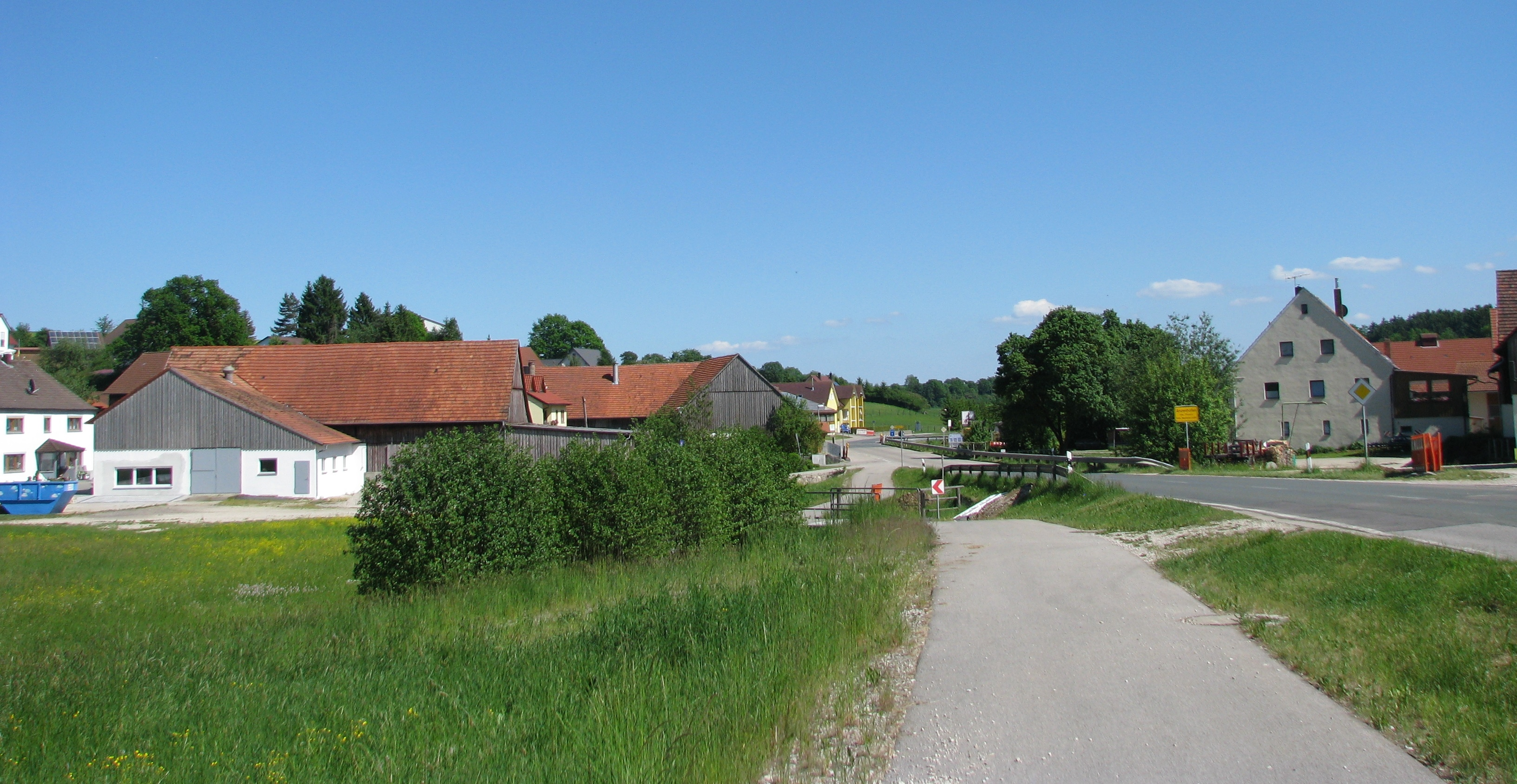 Anzenhofen, Ortsteil von Pilsach im Landkreis Neumarkt i. d. Opf.